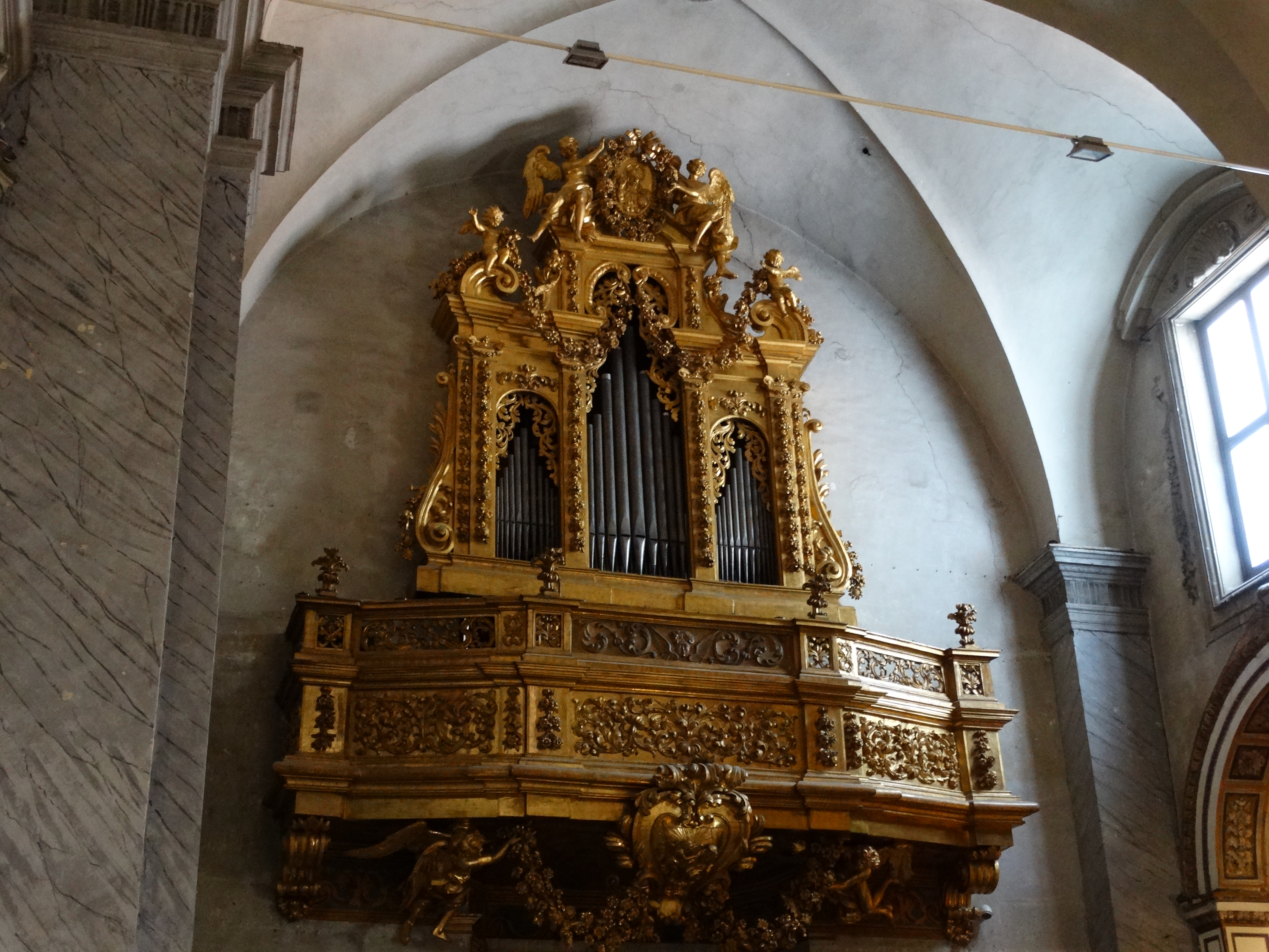 Organo a canne di Giacomo Alari 1686, ampliato da Attilio Priori nel 1884